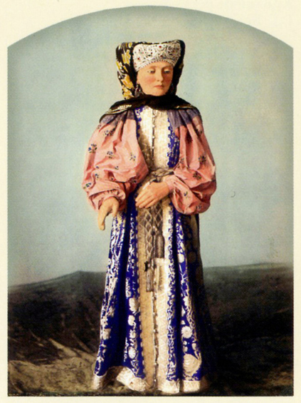 Митрейтер Уральская казачка 1880-е В 1867 году в Москве состоялась знаменитая Этнографическая выставка. На выставке демонстрировались "фигуры"-манекены в костюмах народов Российской империи.Манекены изготавливались профессиональными художниками-скульпторами,а некоторые фигуры создавались прямо с натуры. После окончания выставки демонстрировавшиеся на ней манекены были специально сфотографированы в мастерской венского фоторгафа Т. Митрейтера, сотрудничавшего с Московским Публичным и Румянцевским музеями.Фотографии сделанные на солёной бумаге,были раскрашены акварелью и помещены в паспарту.Вся эта редкая коллекция фотографий хранится в Российском Этнографическом музее Санкт-Петербурга.